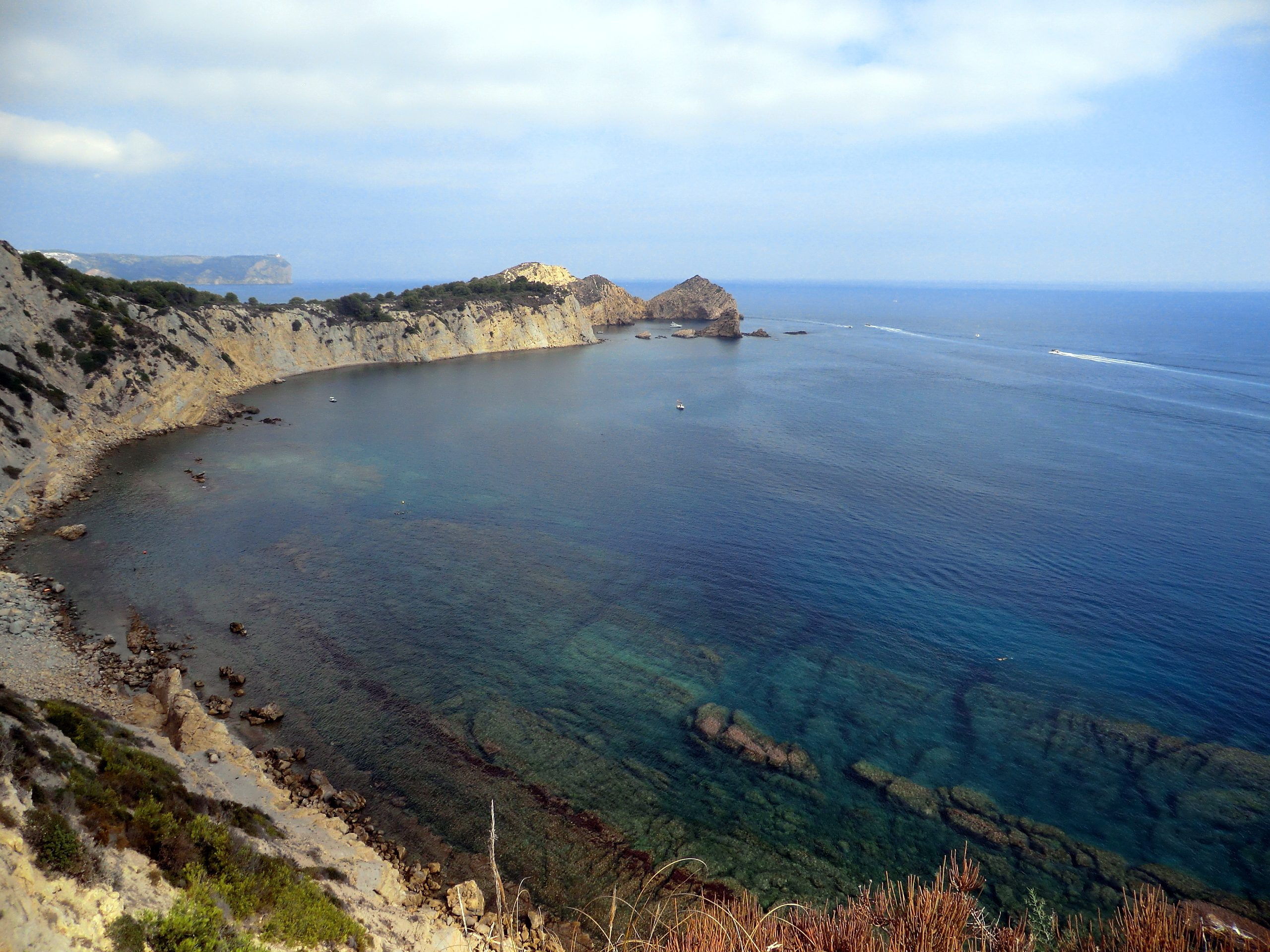 Aguas cristalinas de la costa de Javea (Acantilados de la Marina) This is a photography of a Special Area of Conservation in Spain with the ID: ES5213018. Natura2000 entry, EEA entry